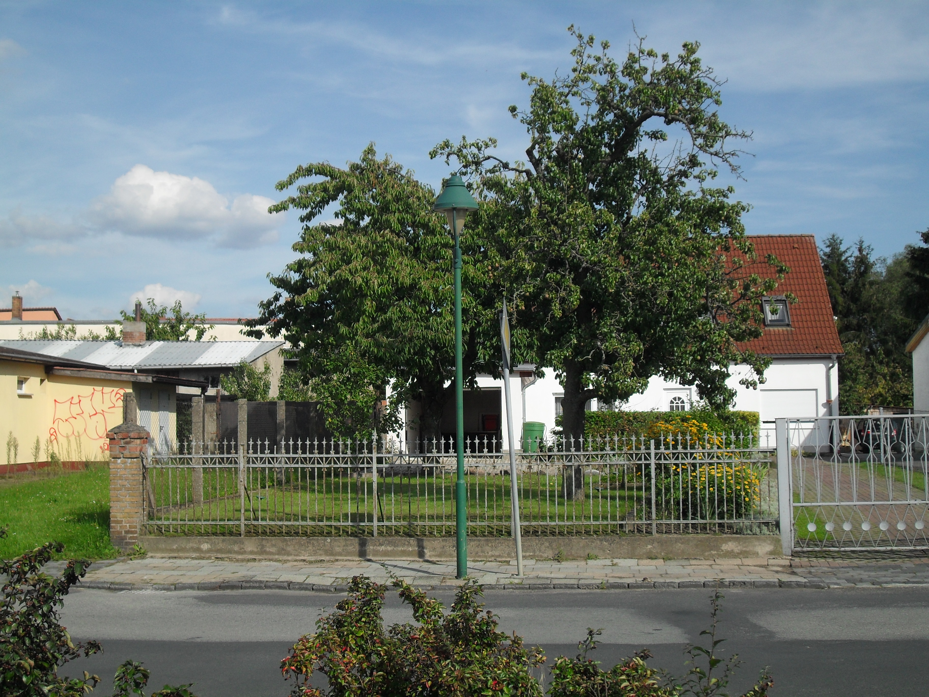 Das Foto zeigt den ehemaligen Standort der Altstrelitzer Synagoge am Alexanderplatz in Strelitz-Alt. Erhalten blieb der schmiedeeiserne Zaun von 1913.